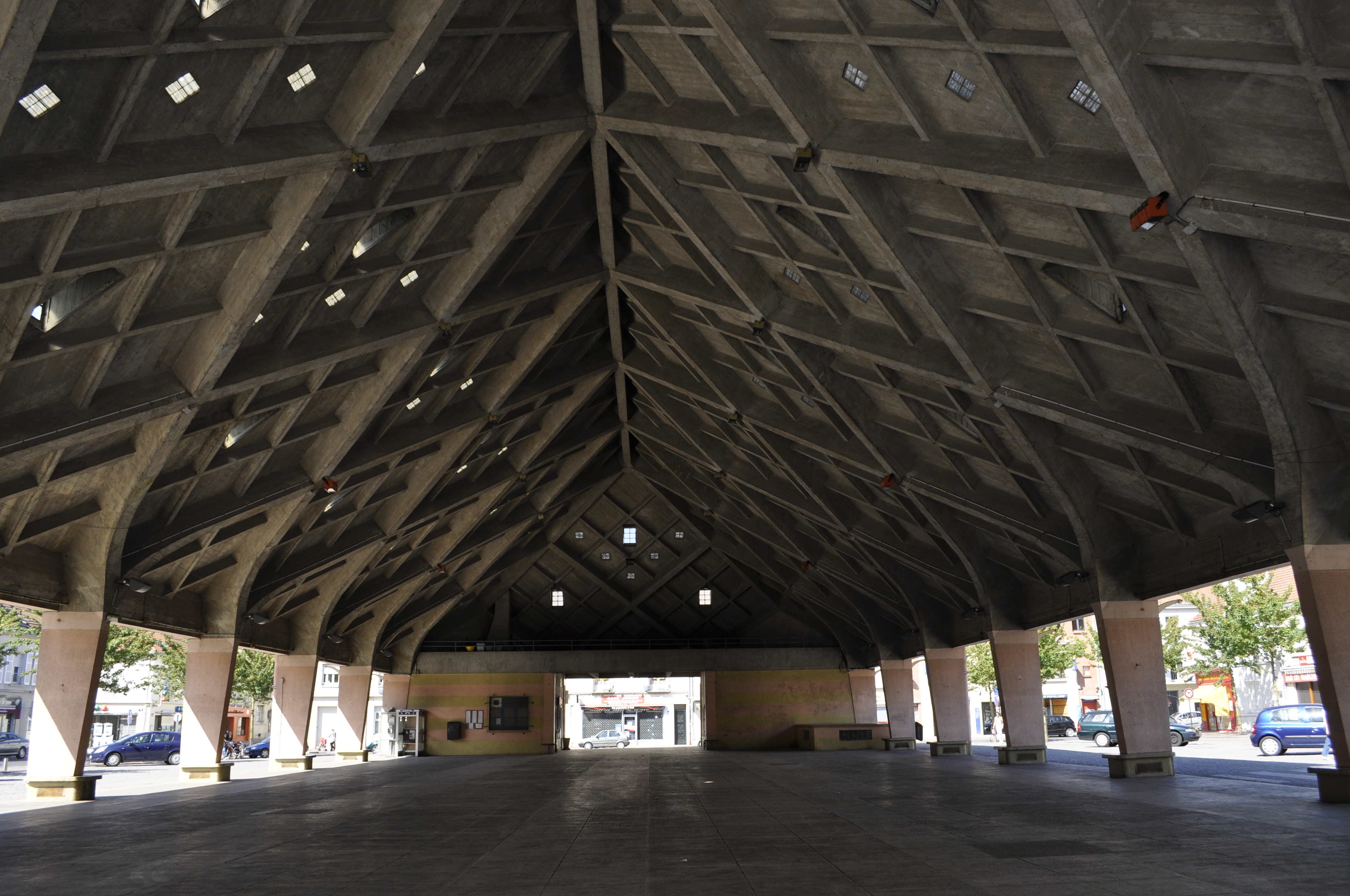 Vitry-le-François : centre ville, halles, place de la Halle, élévation et toiture.